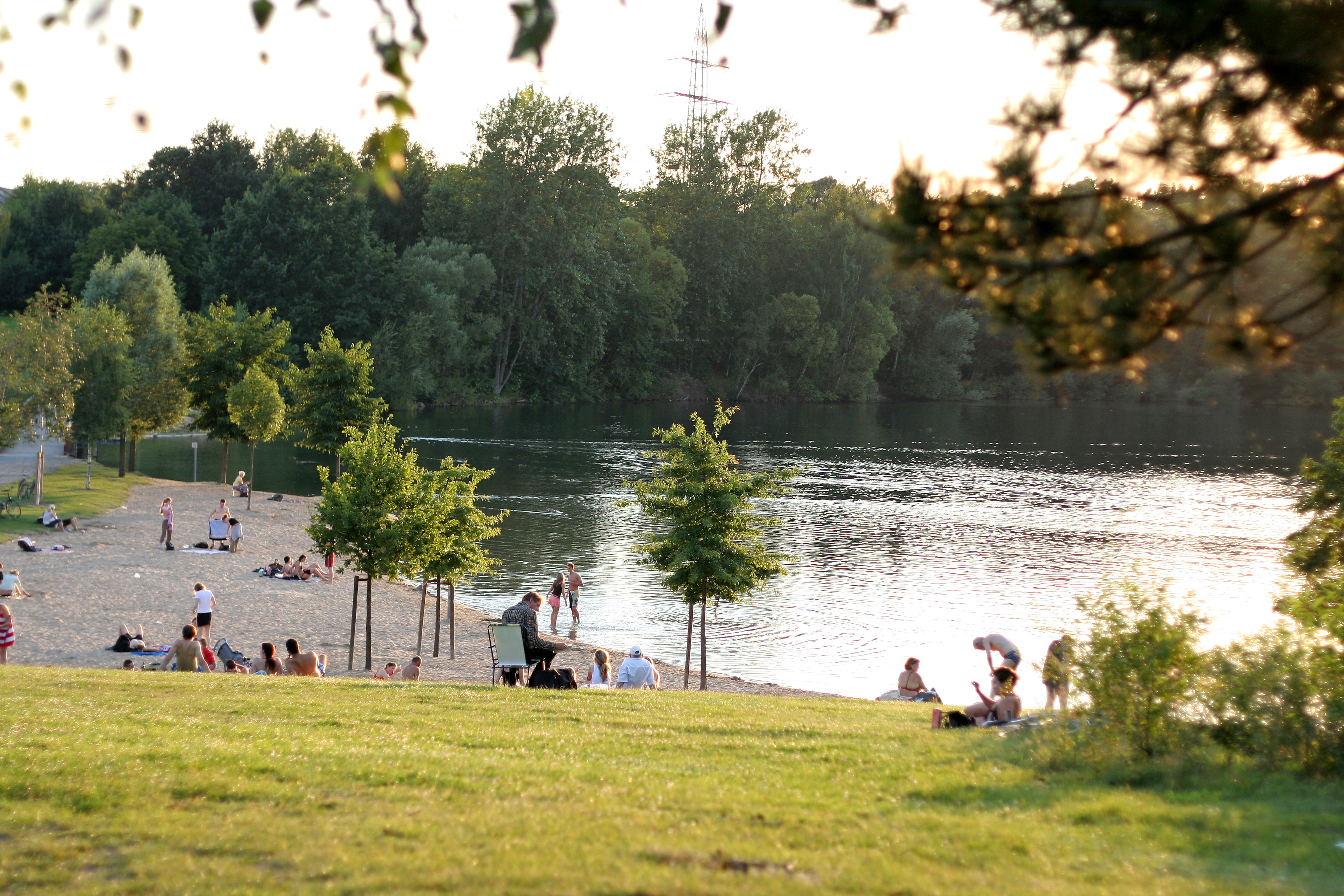 Braunschweig Heidbergsee